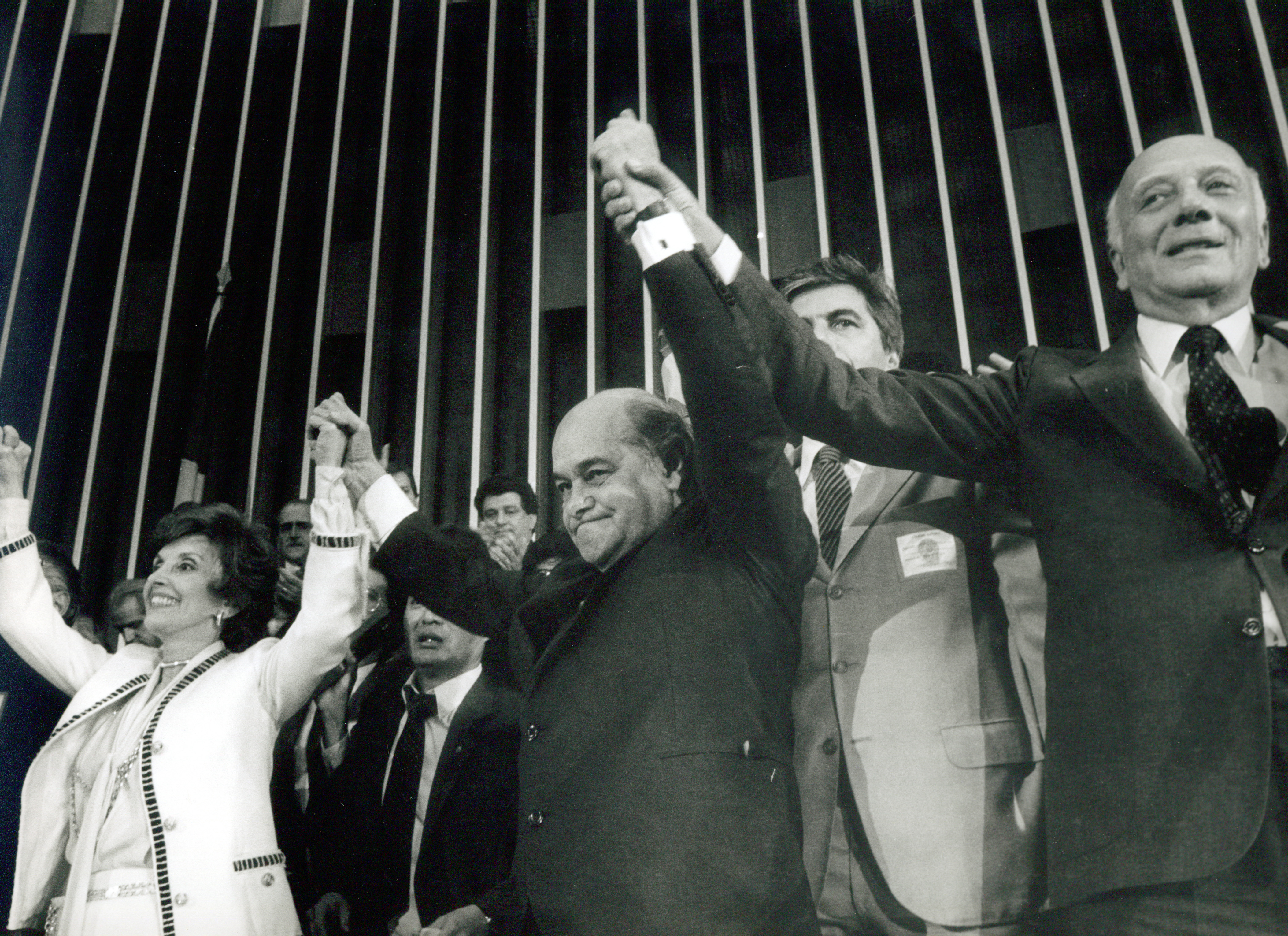 Tancredo, entre Ulysses Guimarães e dona Risoleta, após eleição indireta para Presidente da República, Colégio Eleitoral, plenário da Câmara dos Deputados. Na véspera da posse, em 14 de março, Tancredo seria internado e Sarney, o vice, assumiria o cargo. Depois de sete cirurgias, Tancredo Neves morreu no dia 21 de abril em São Paulo. Data: 15/01/1985. Foto: Célio Azevedo